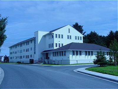 USCG Kodiak Guest House, Alaska.